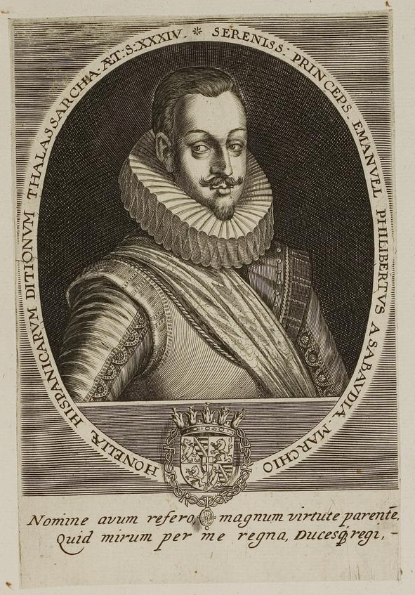 Grafik aus dem Klebeband Nr. 1 der Fürstlich Waldeckschen Hofbibliothek Arolsen Motiv: Emanuel Philibert von Savoyen